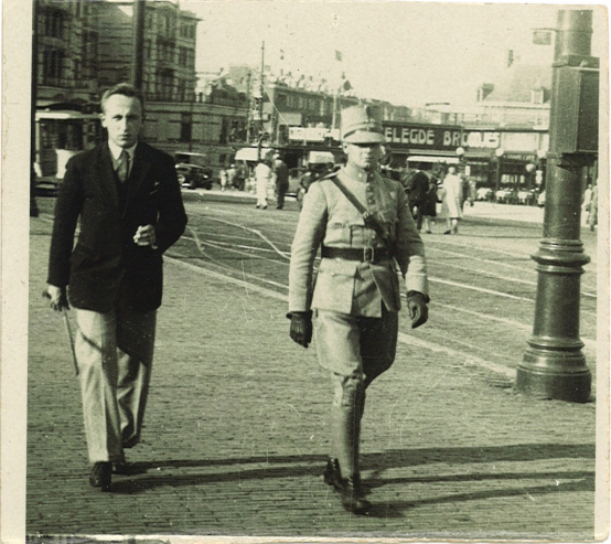 Luitenant P.C. Kroon in uniform op een onbekende locatie.